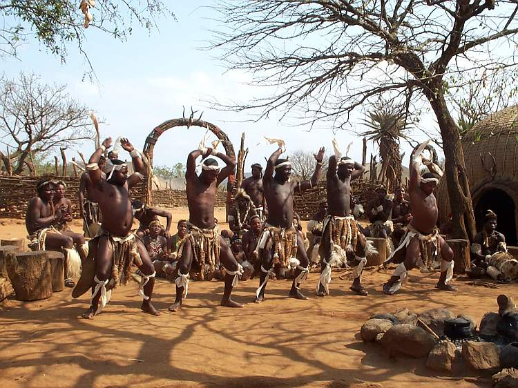 Zulu Krieger beim Kriegstanz (touristisch)